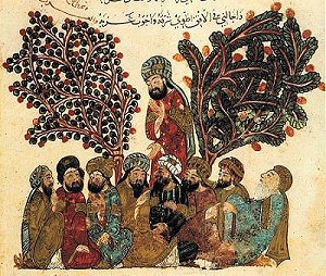 The Maqamat of Badi Al-Zaman Al-Hamadhani, From The 9 th century. صفحة من مقامات بيدع الزمان الهمذاني تعود للقرن التاسع الميلادي. المصدر